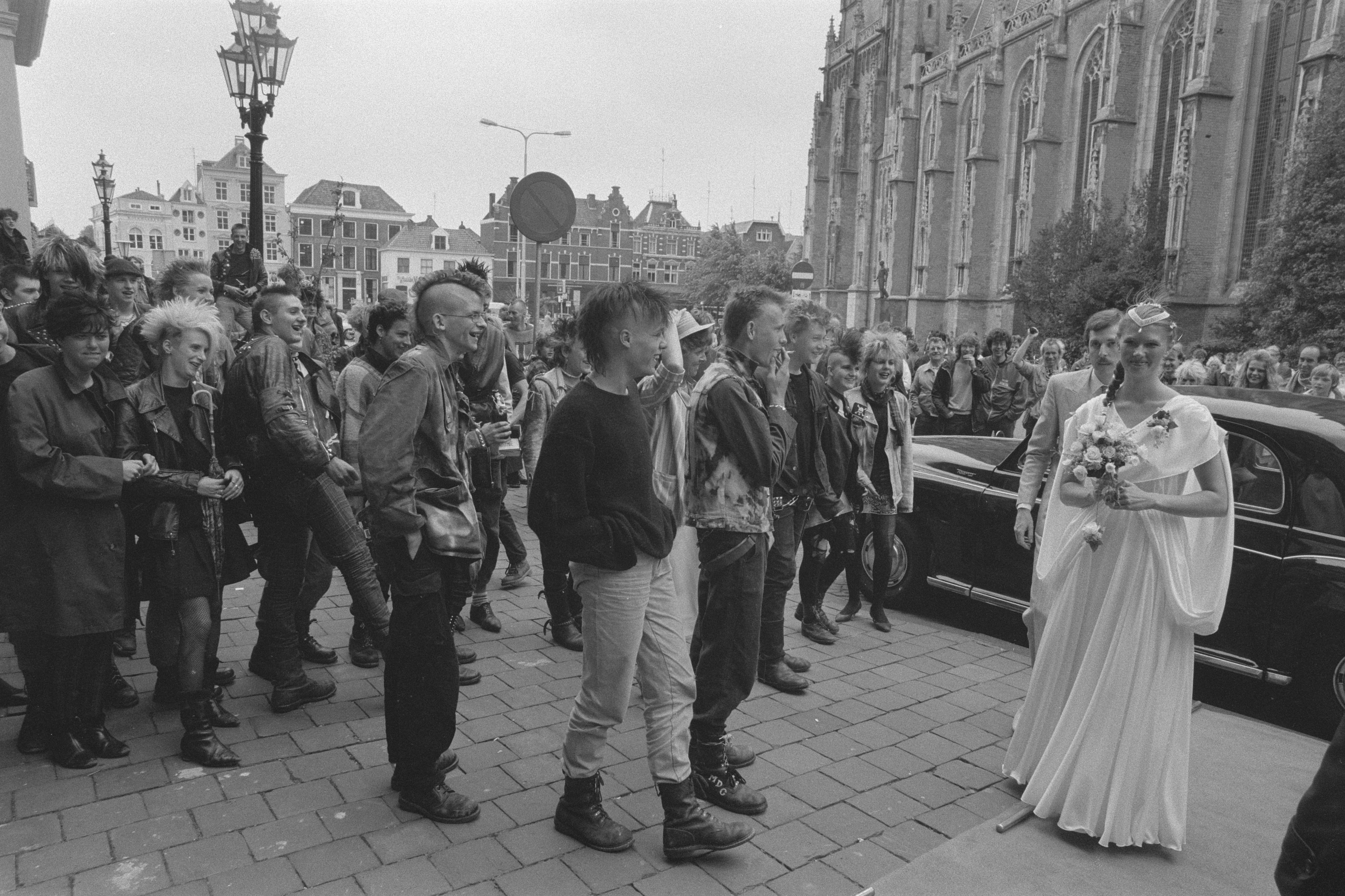 Collectie / Archief : Fotocollectie Anefo Reportage / Serie : [ onbekend ] Beschrijving : Doe wat festival in Deventer (festival van actiegroepen); groep punkers kijkt naar bruidspaar Datum : 22 juni 1984 Locatie : Deventer Trefwoorden : bruidsparen, demonstraties, festivals, punkers Fotograaf : Antonisse, Marcel / Anefo Auteursrechthebbende : Nationaal Archief Materiaalsoort : Negatief (zwart/wit) Nummer archiefinventaris : bekijk toegang 2.24.01.05 Bestanddeelnummer : 933-0118